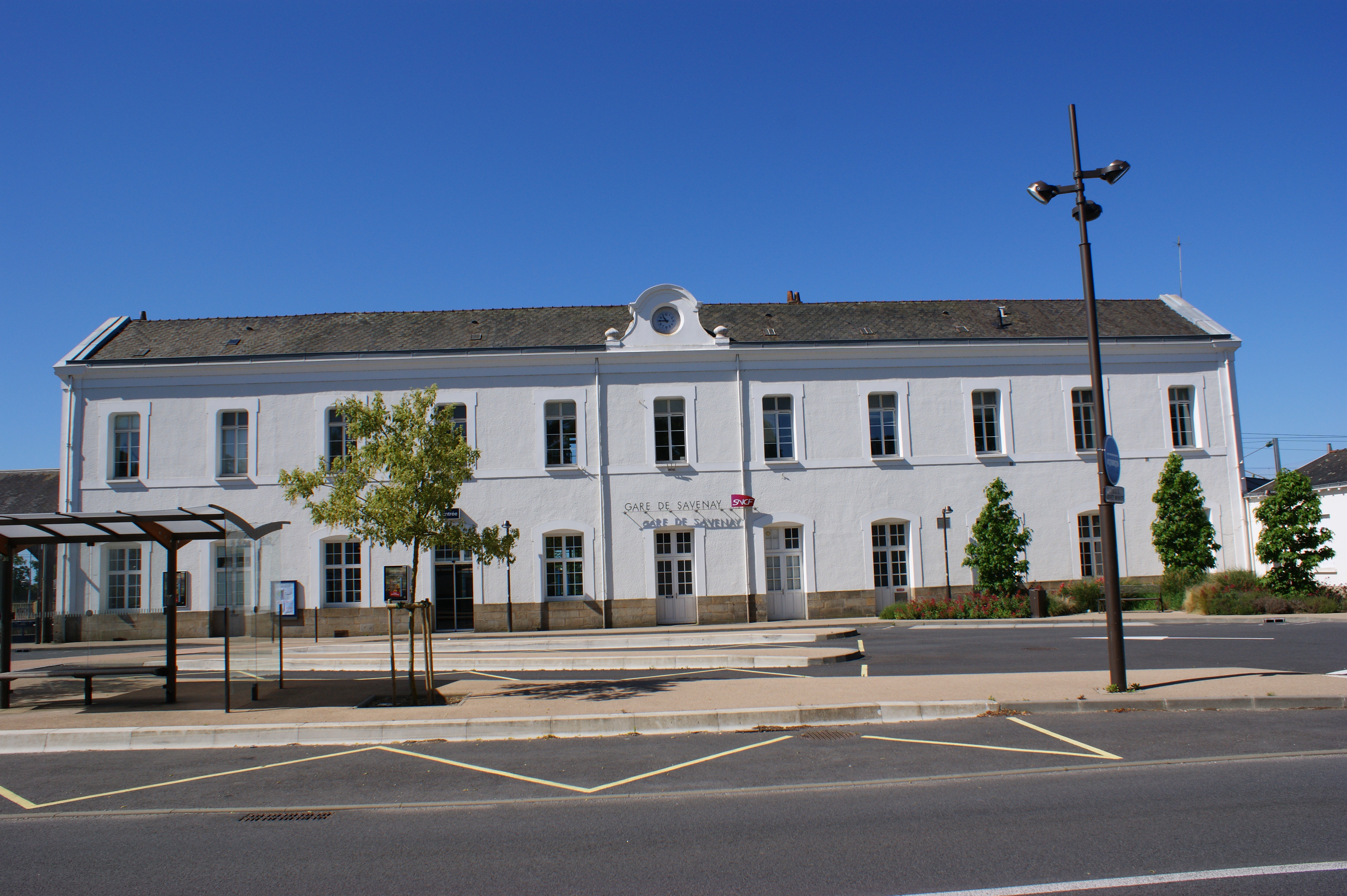 Gare de Savenay, le bâtiment voyageurs et l'entrée de la gare.